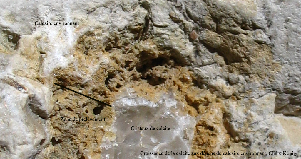 La croissance d'une substance cristalline aux dépens d'une autre substance cristalline porte le nom général de topotaxie